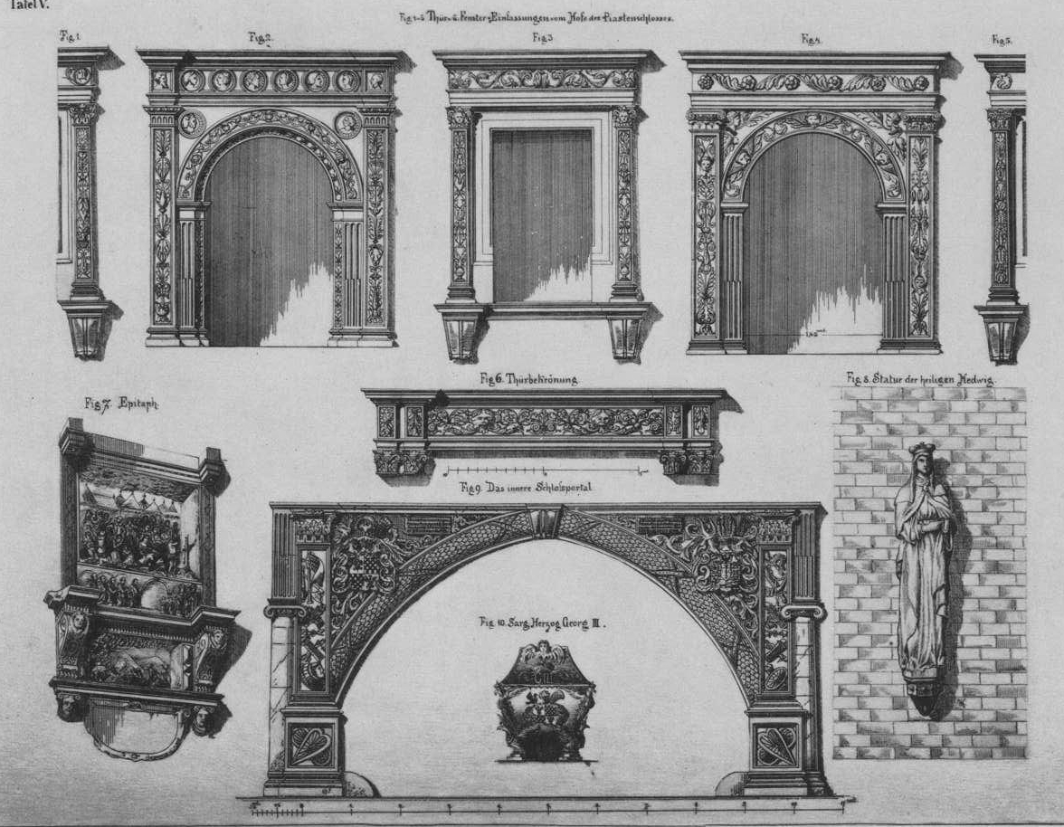 Zamek Piastów w Brzegu ornamenty architektoniczne.